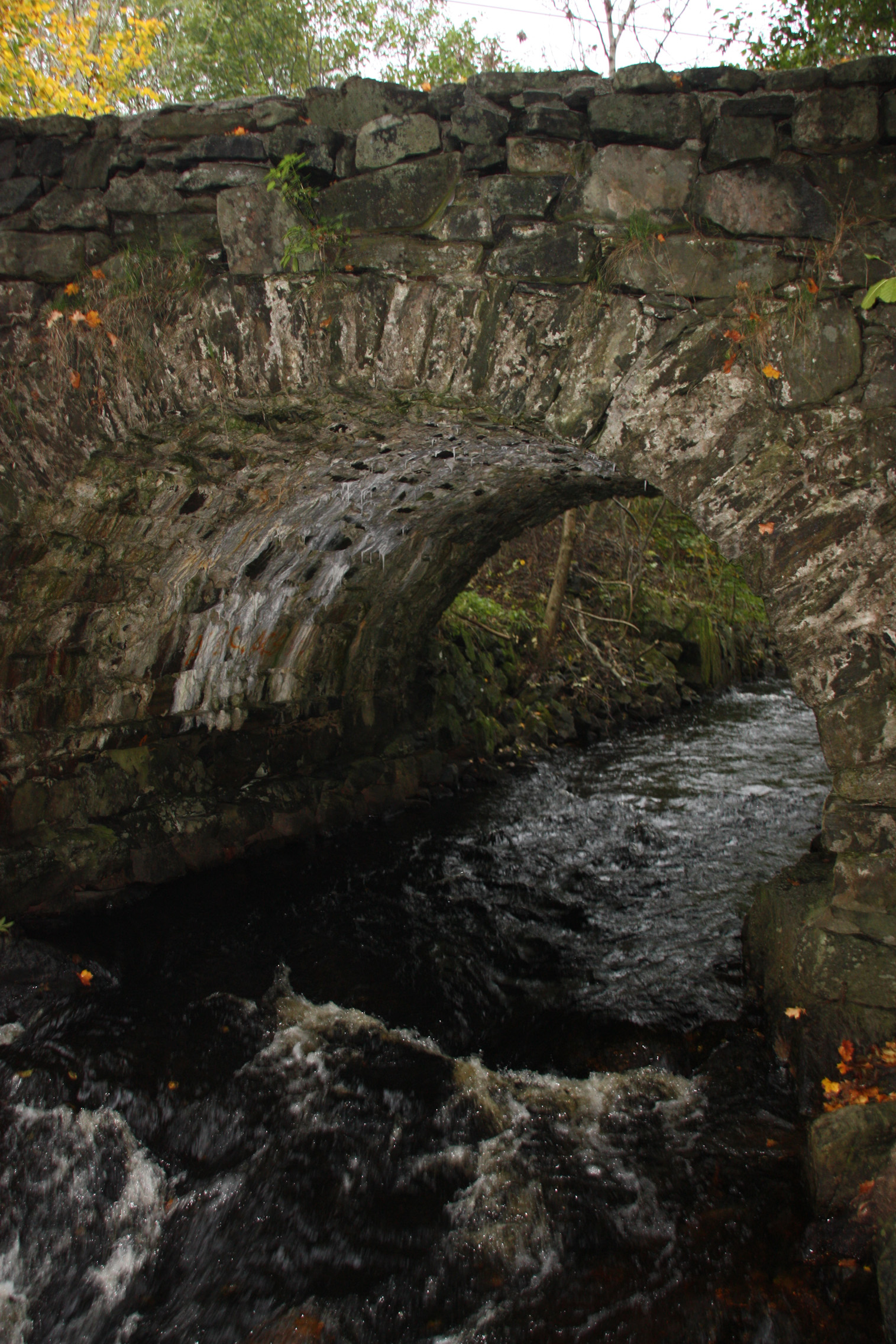 Naude bro på Asdal i Arendal kommune